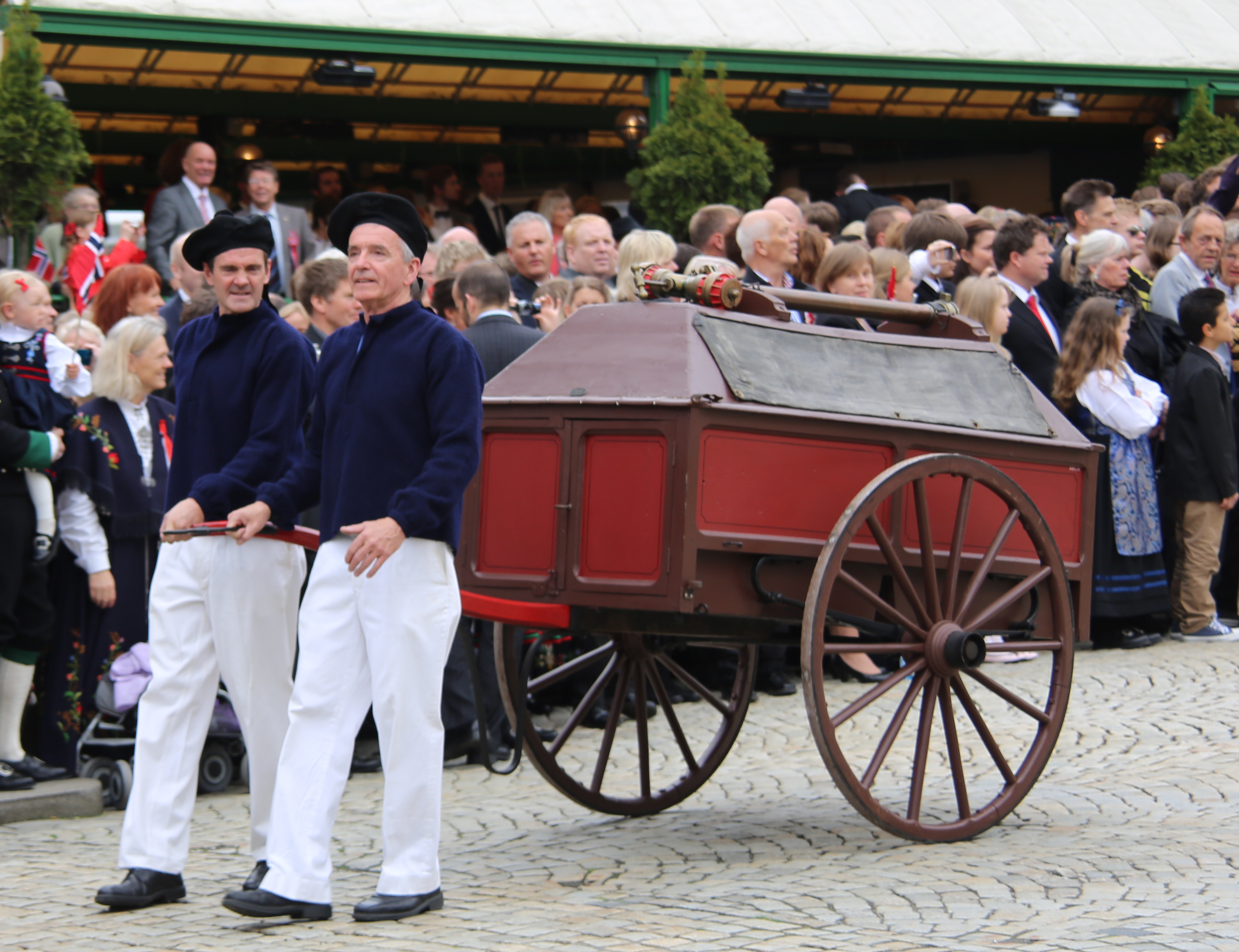 Bergen brannvesen